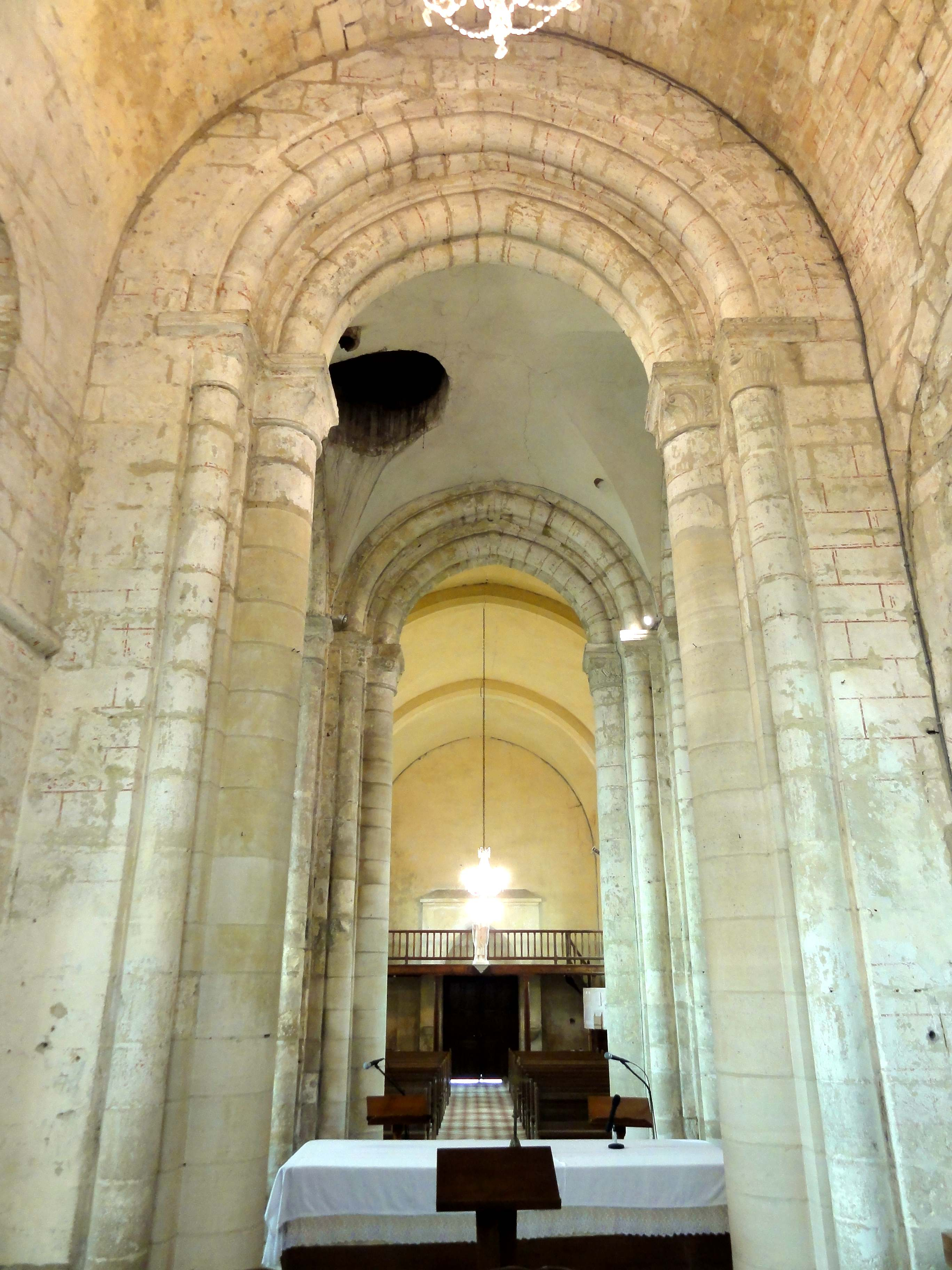 Intérieur de l'église (voir titre).